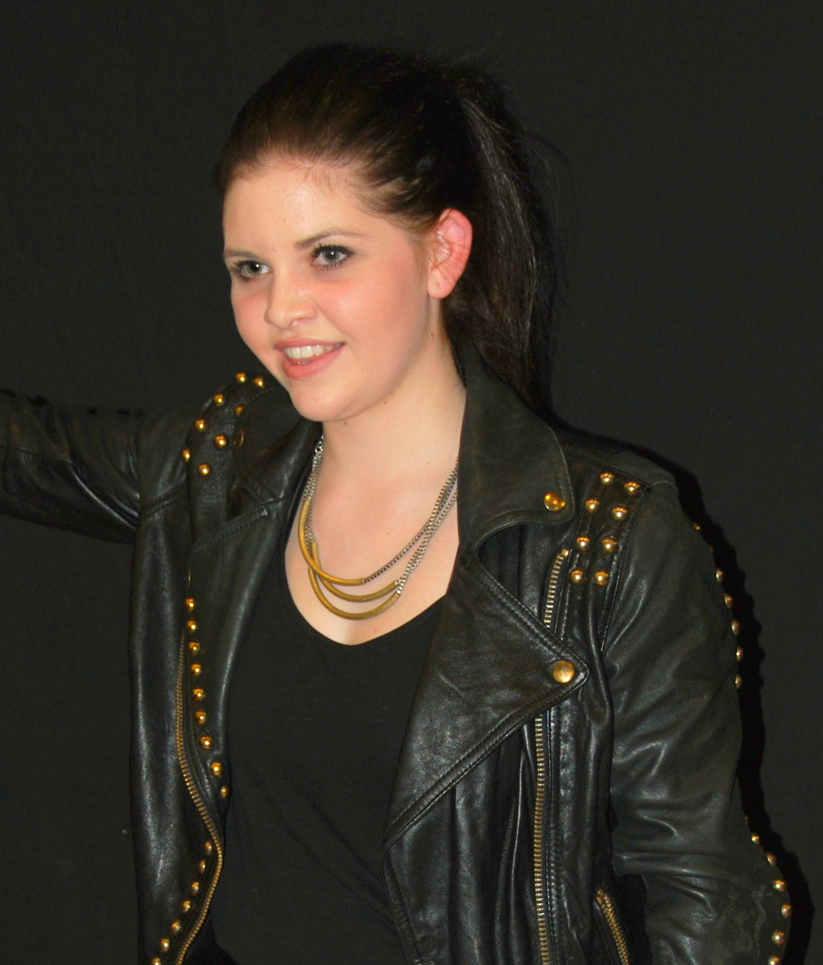 Line Larsen, sangerinde og finalist i X Factor 2012. Her ved et arrangement i Sct. Mathias Centret i Viborg.